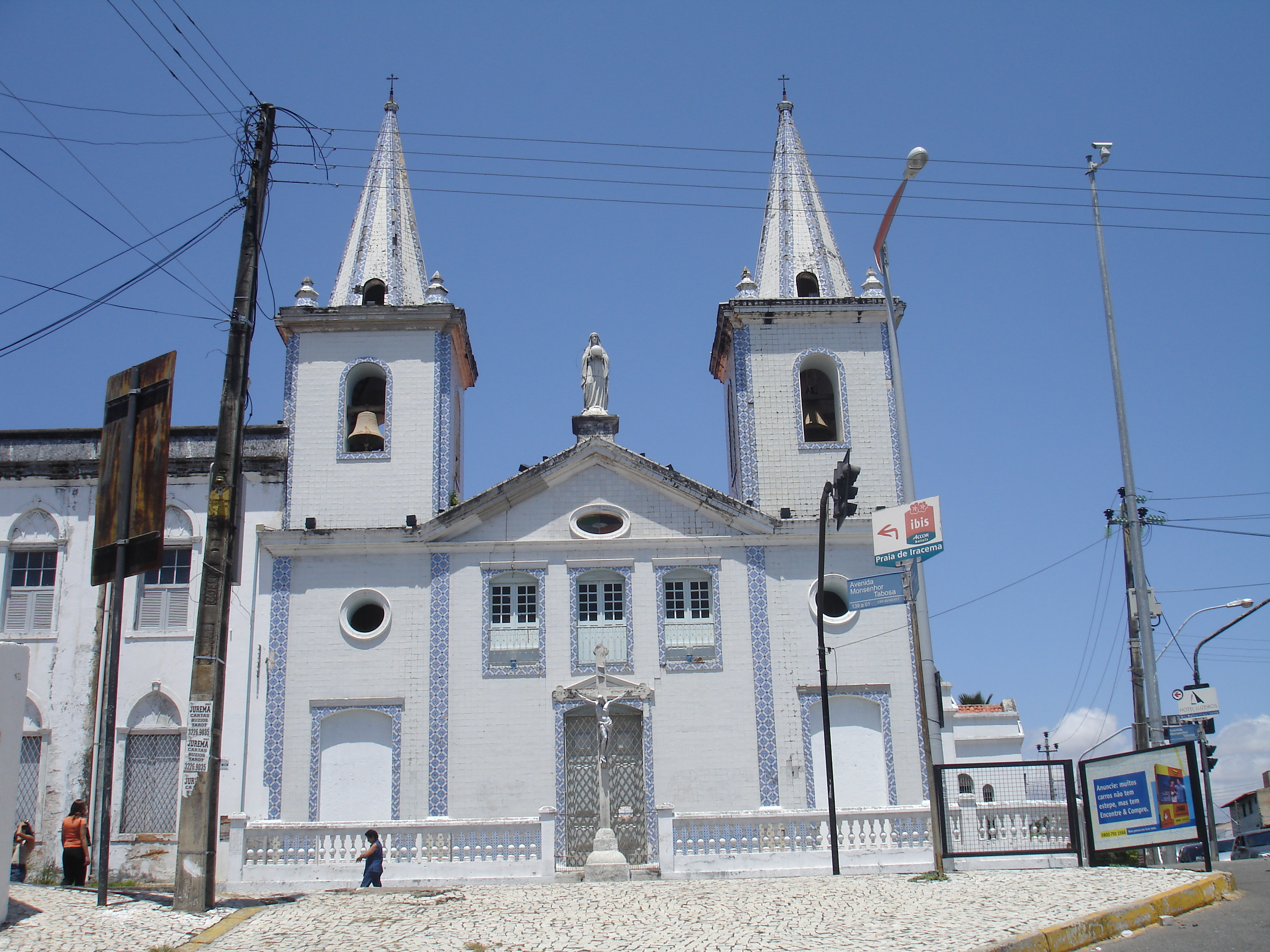 Seminário da Prainha, Fortaleza, Ceará, Brazil. 2006.